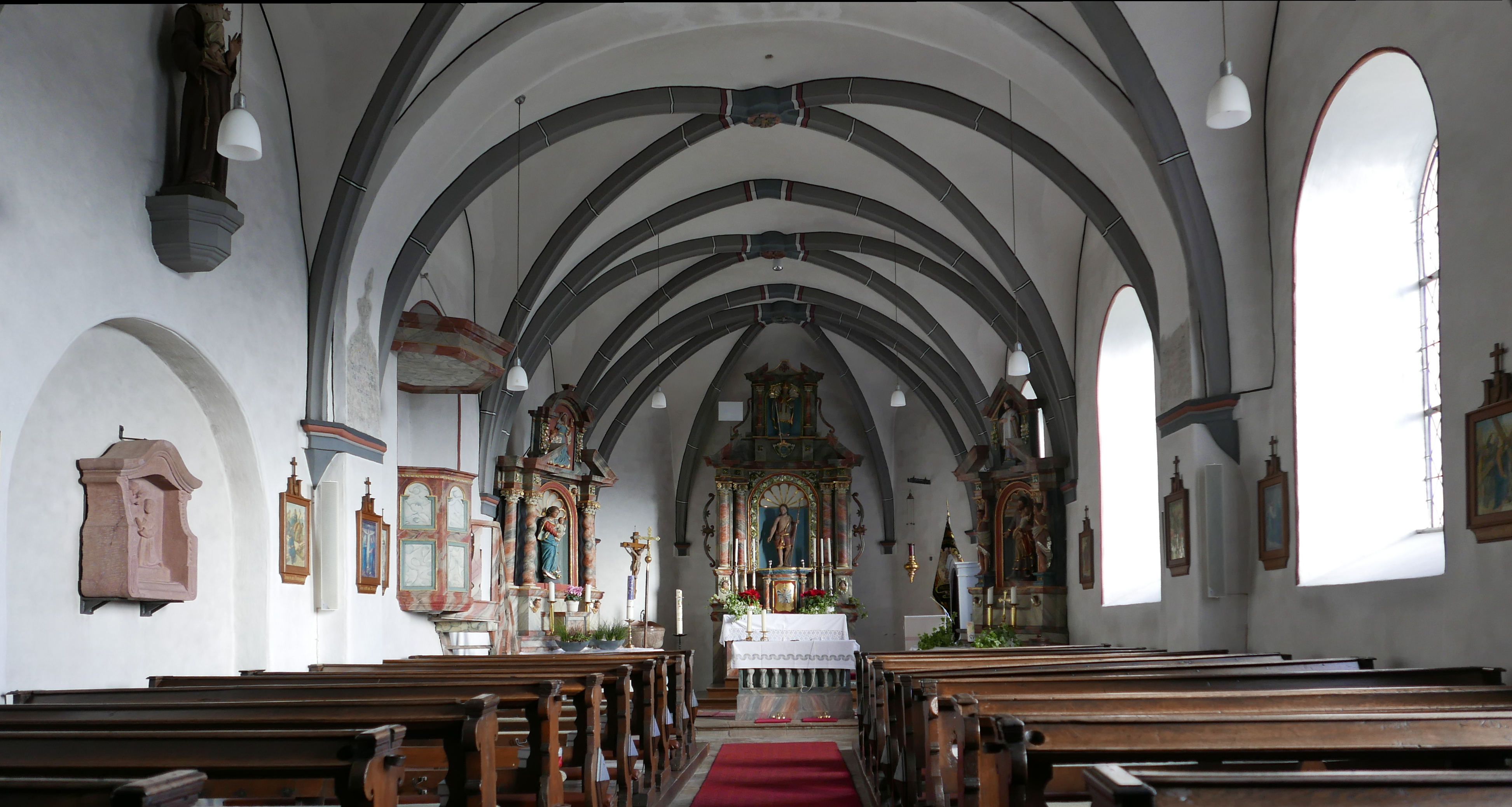 Mülheim, Ortsgasse 2; kath. Pfarrkirche 4, innen, nach O